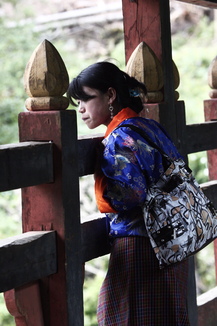 Woman in Bhutan, 2011